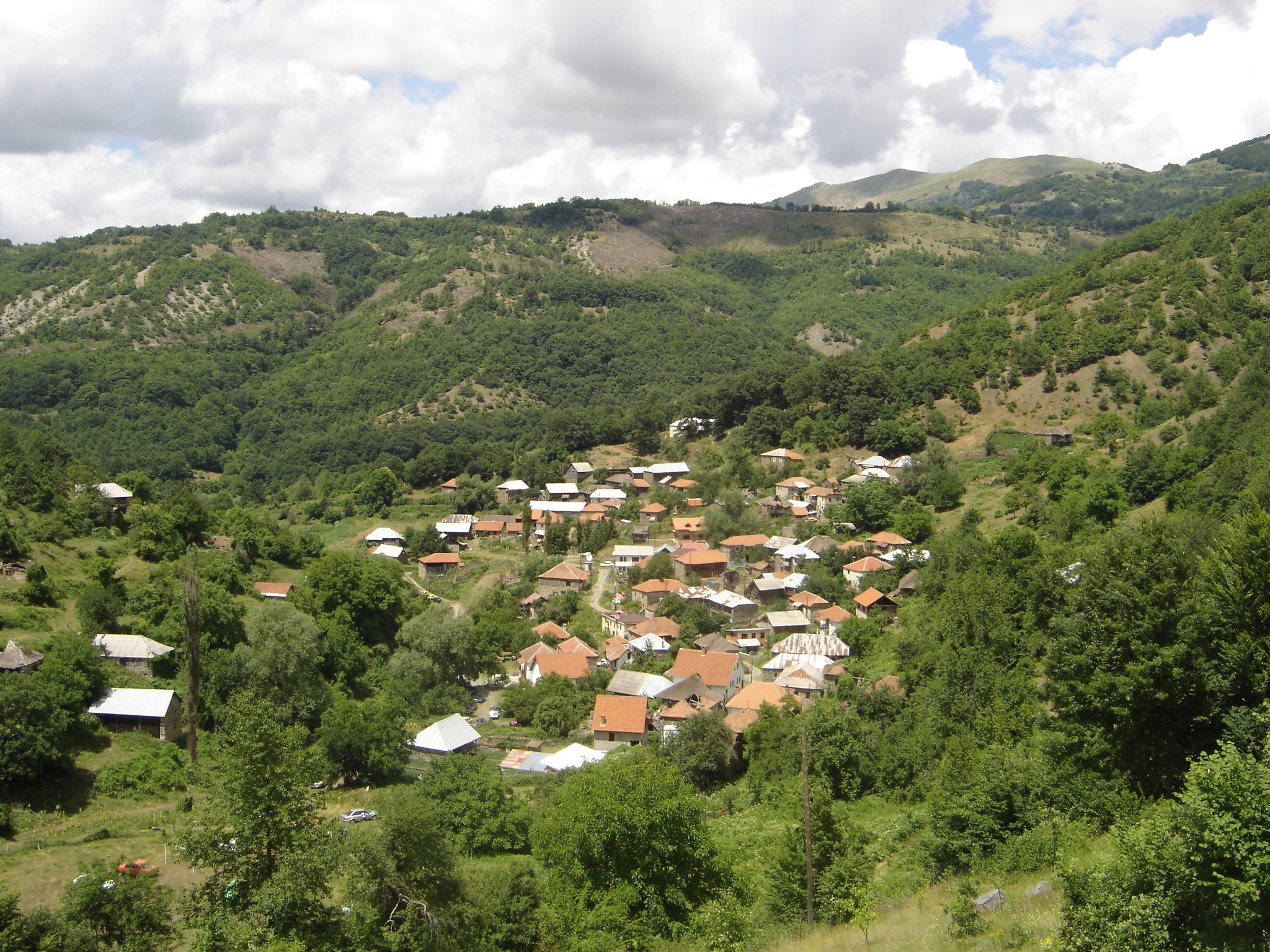 Село Брежани, Република Македония.